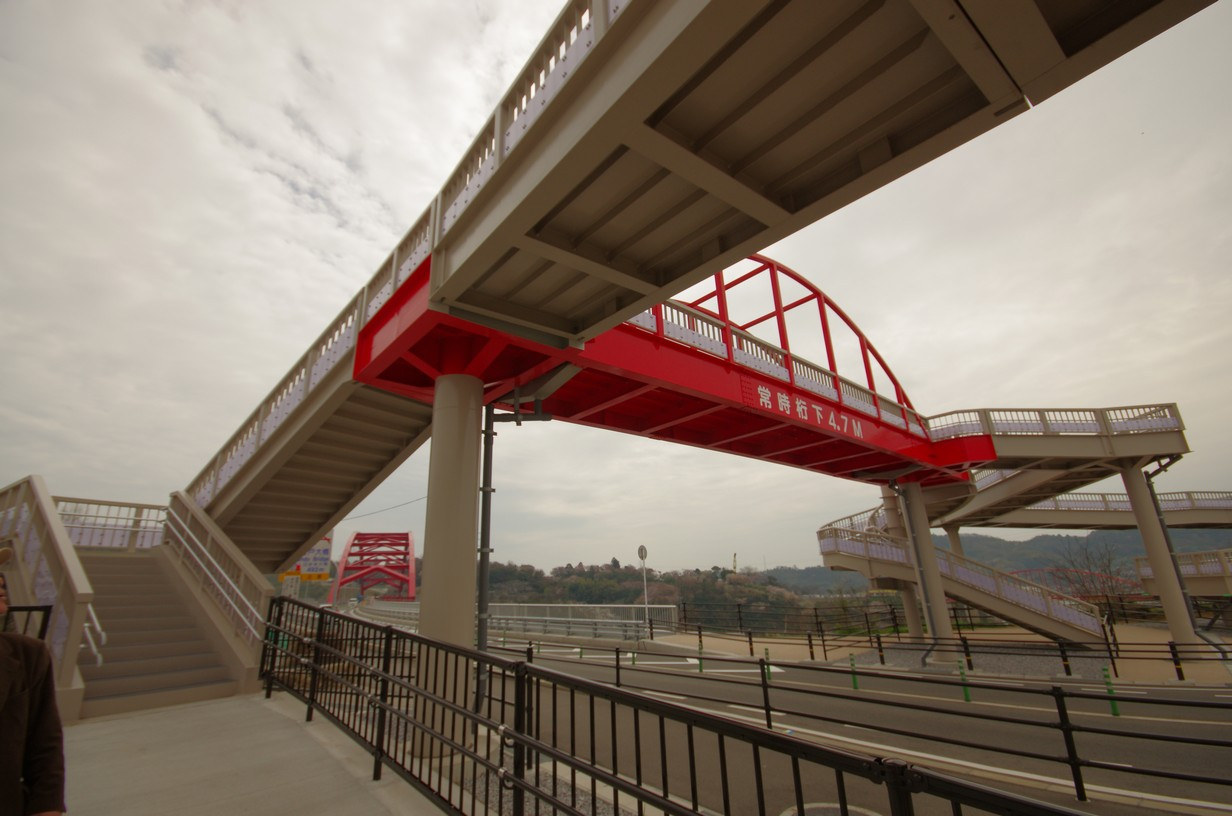 第三音戸大橋